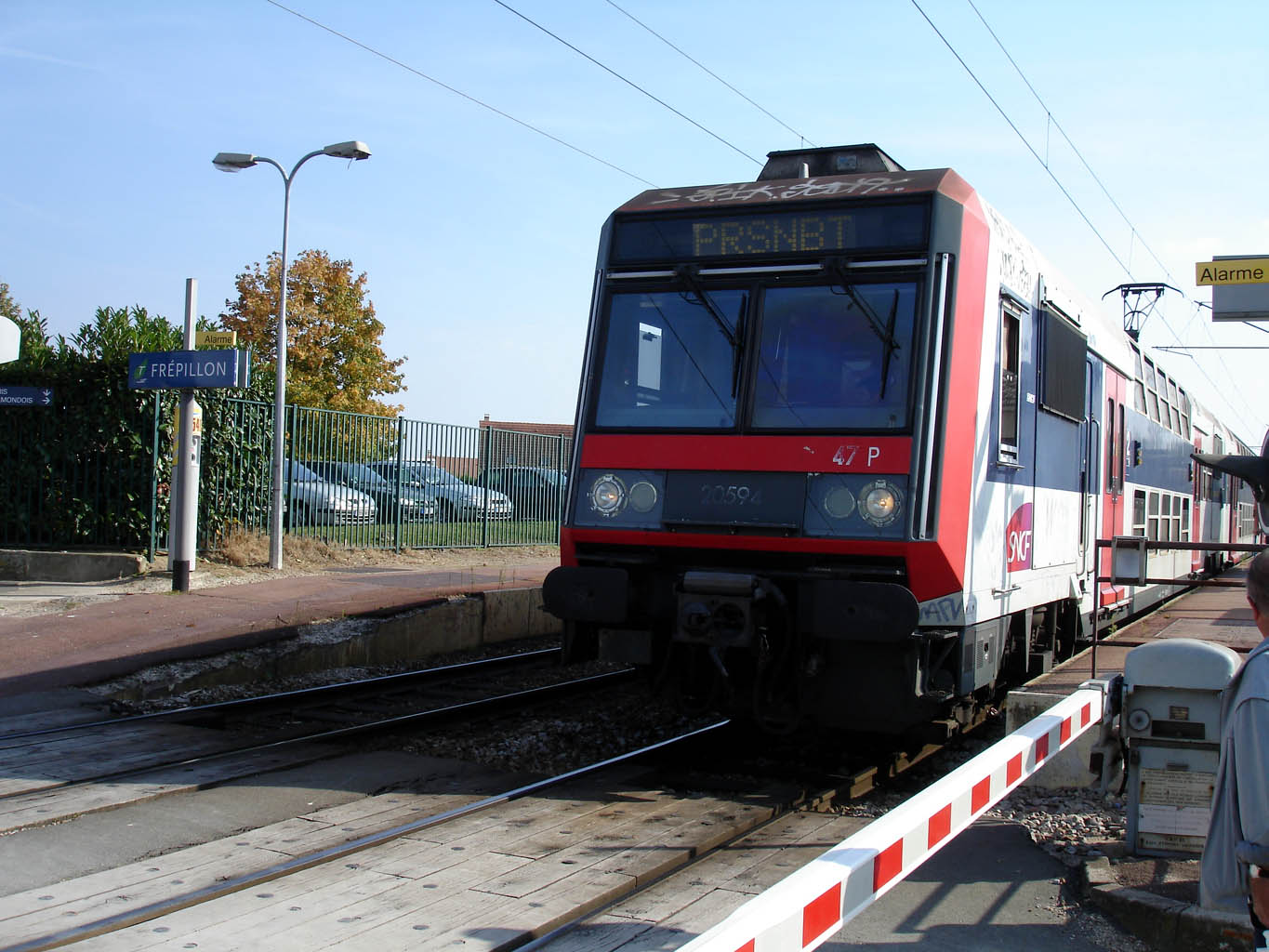 Halte de Frépillon (Val-d'Oise), France Rame Z 20500 au départ, en direction de Persan-Beaumont Septembre 2007 Photo personnelle (own work) de Clicsouris